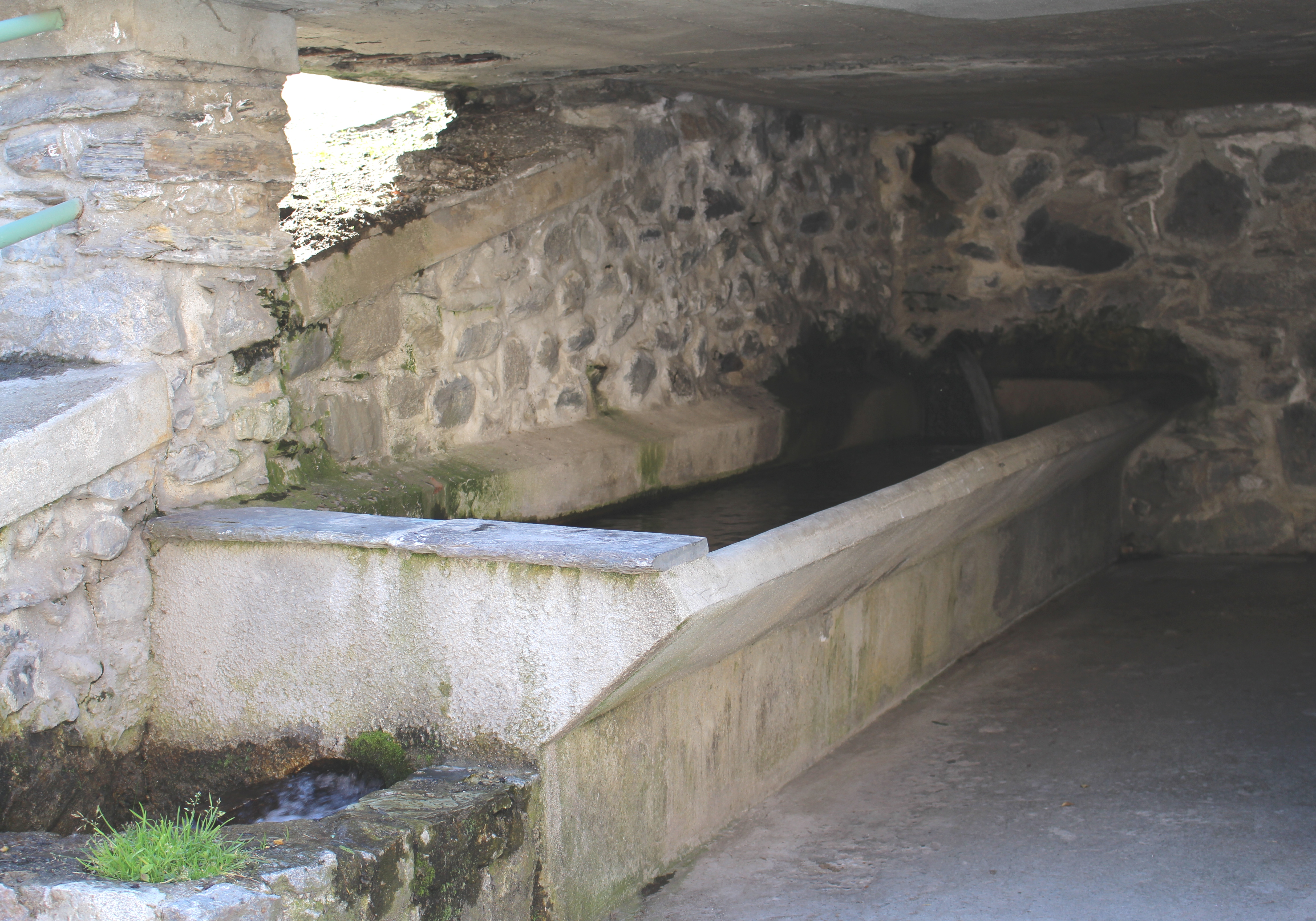 Lavoir de Betpouey (Hautes-Pyrénées)